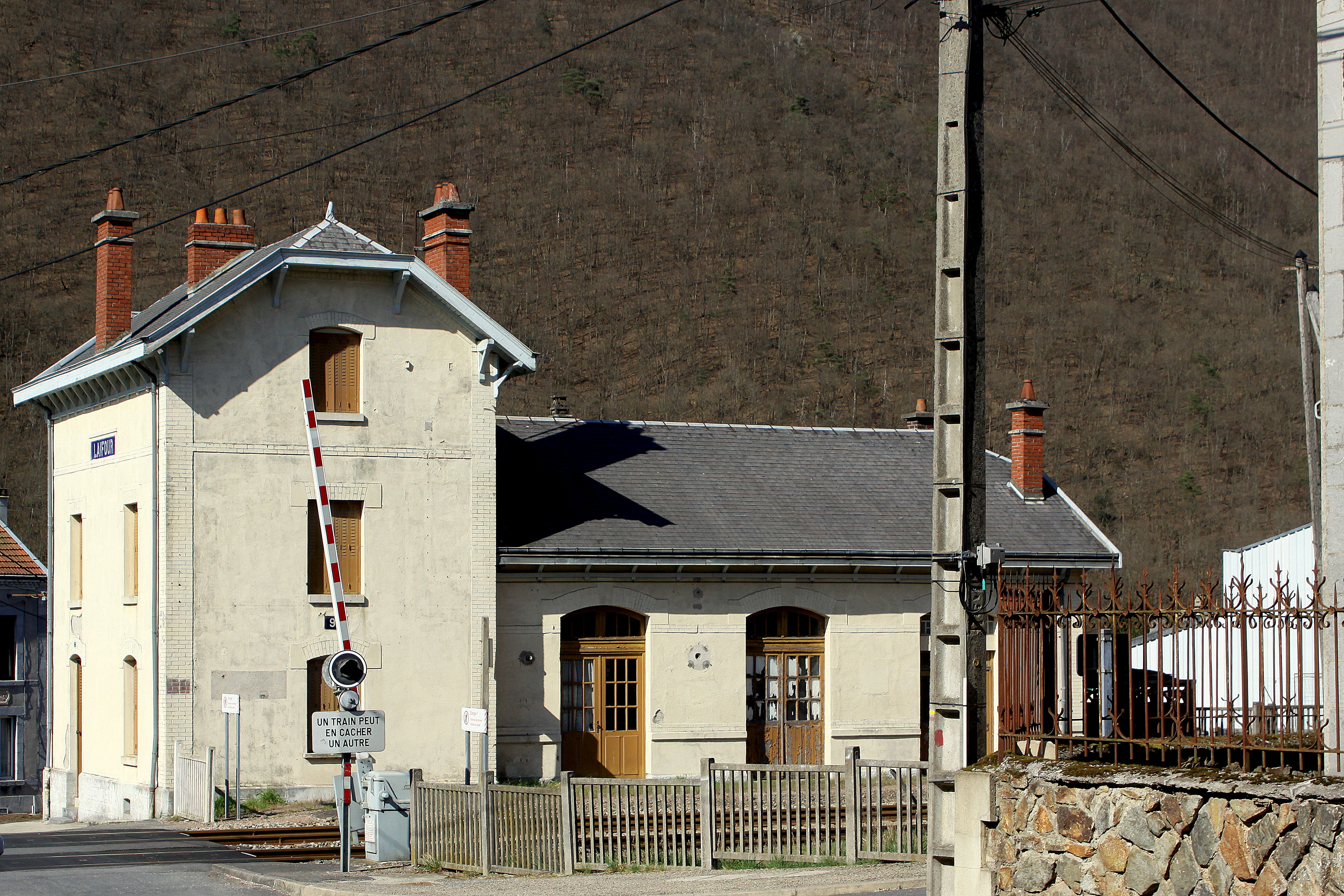 Gare vu Laifour, aalt Gebai.